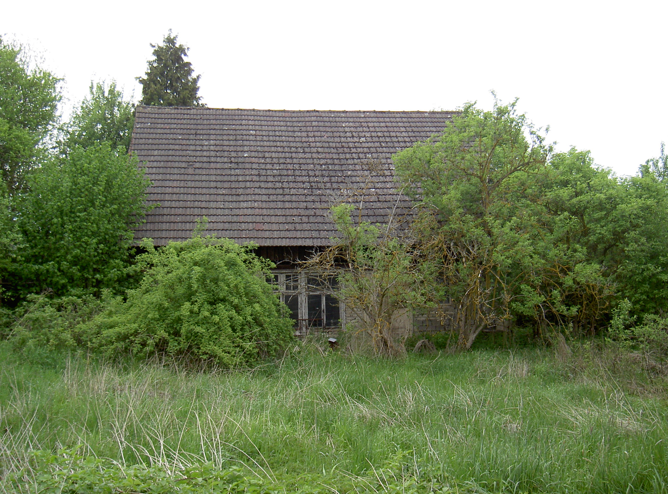 Hühnerstall, in dem Max Bresele seine letzten Lebensjahre verbrachte, in Uckersdorf, Blick von Süden